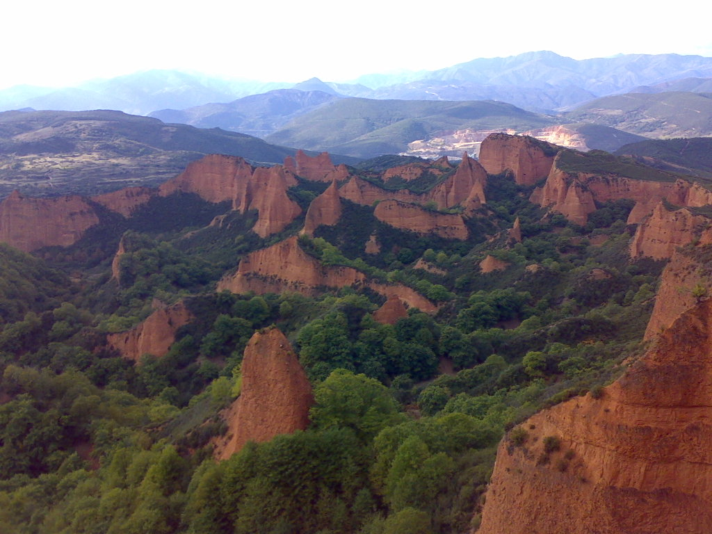 Vista panorámica de Las Médulas desde el mirador de Orellán.